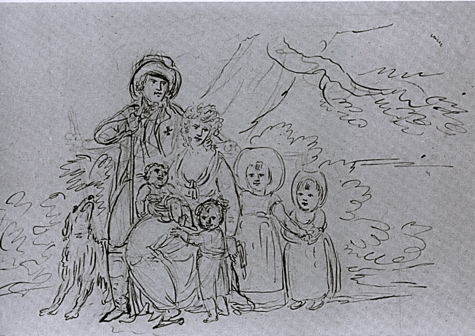 Carl Daniel David Friedrich Bach (1765–1829), 1805 Selbstporträt.jpg